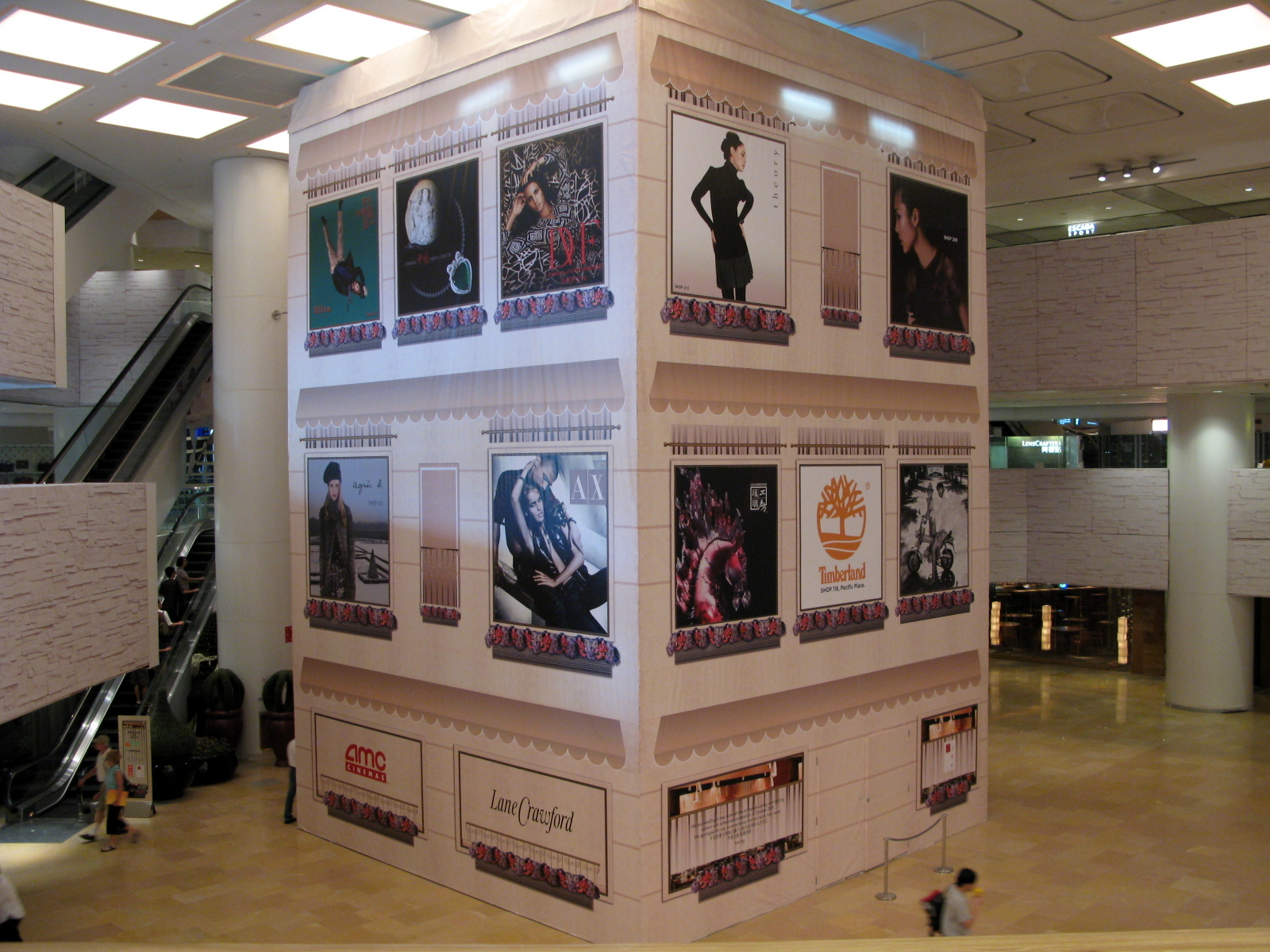 Pacific Place 太古廣場